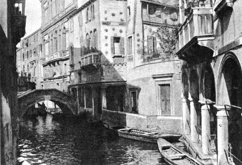 Nach dem Schriftsteller Josef Viktor Widmann (1842–1911) benannter Ponte Widmann (Widmann-Brücke) und Sotoportego Widmann in Venedig